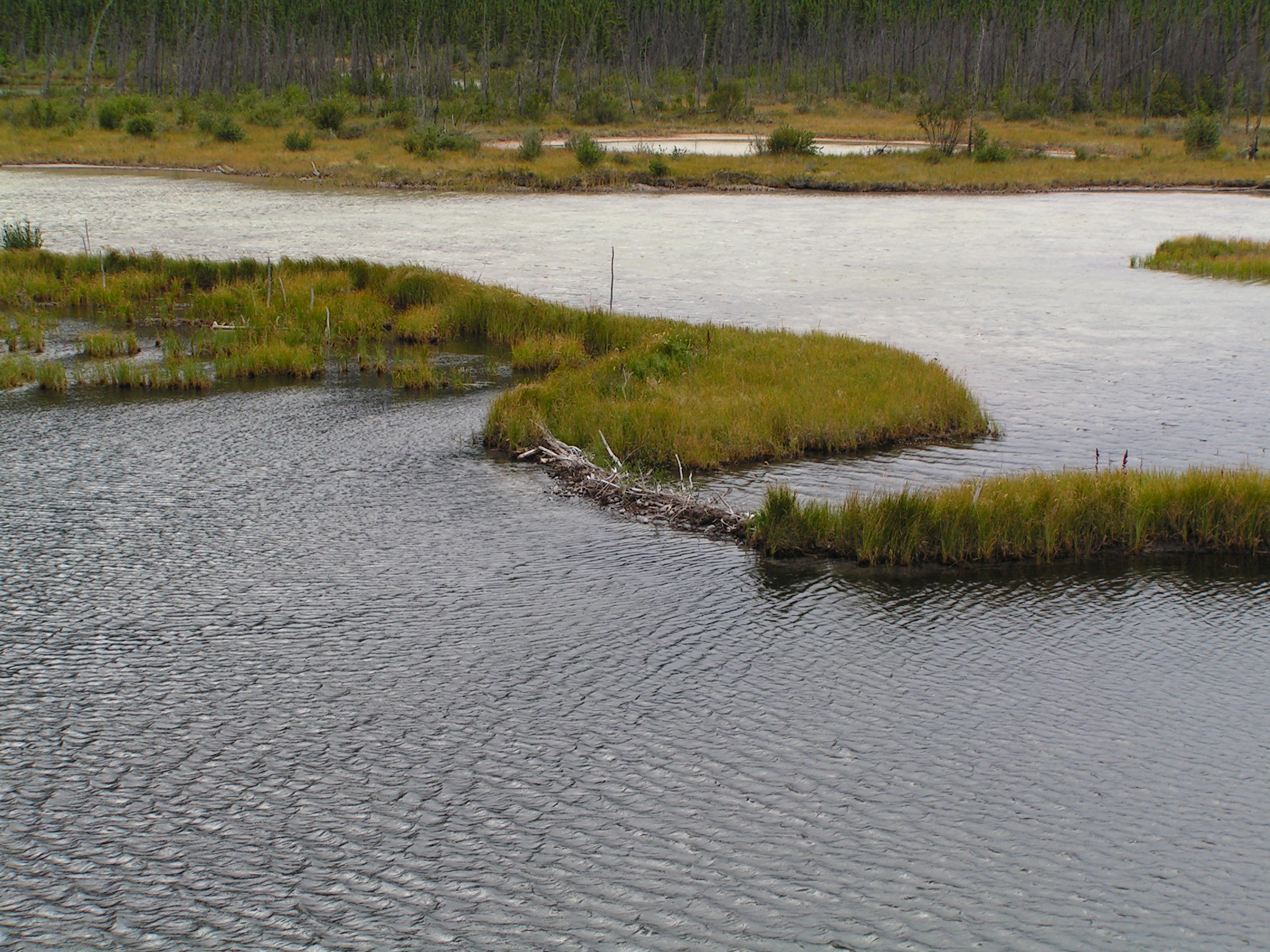 Beaver dam in Jasper National Park, Alberta, Canada